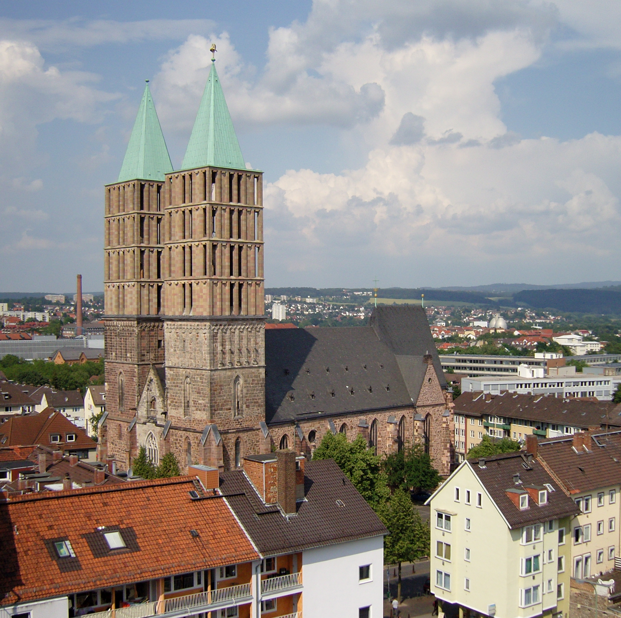 Die Martinskirche in Kassel vom Druselturm aus gesehen